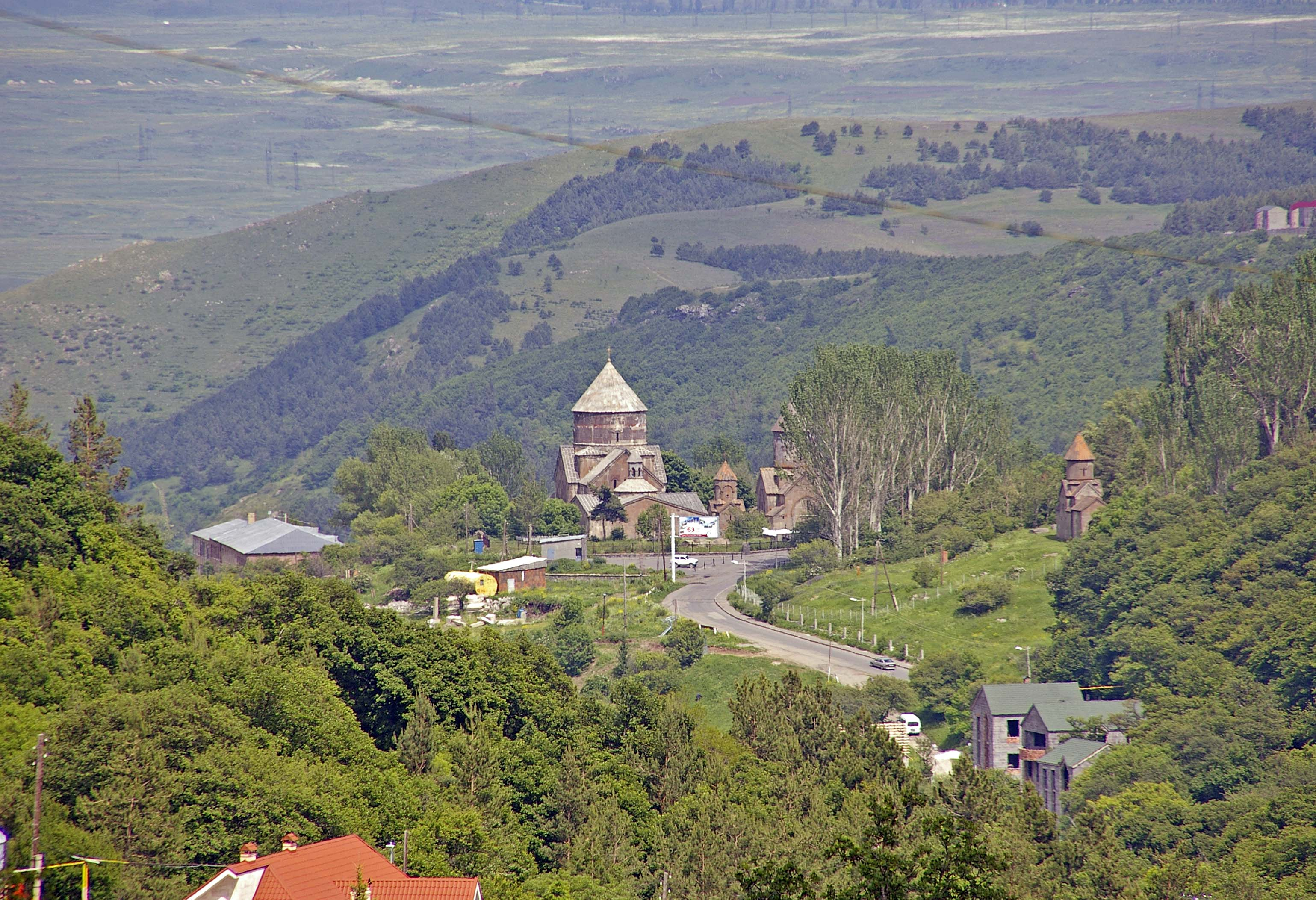 Wintersportzentrum Armeniens im Sommer